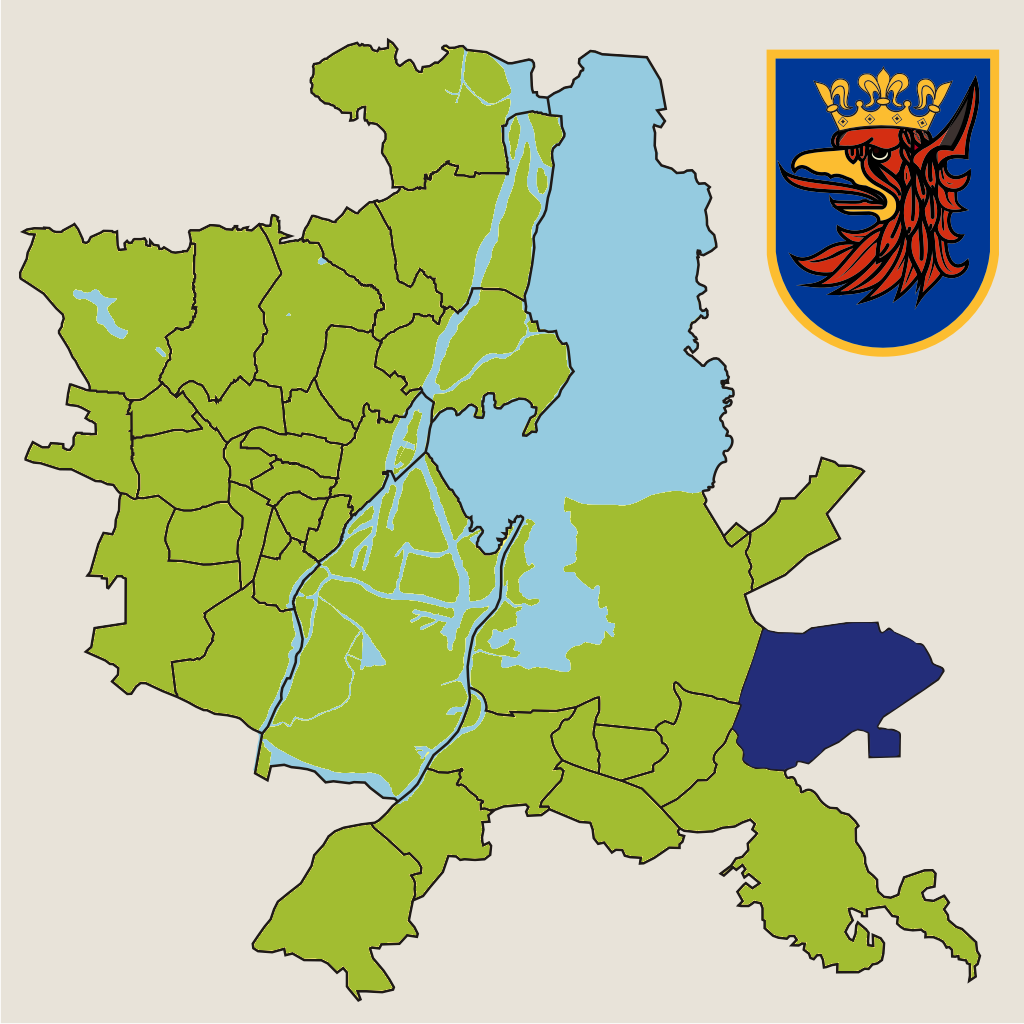 Osiedle "Wielgowo-Sławociesze" w Szczecinie – jednostka pomocnicza miasta w 2010